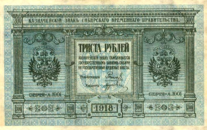 Банкнота номиналом 300 рублей, выпущенная правительством Колчака, аверс.